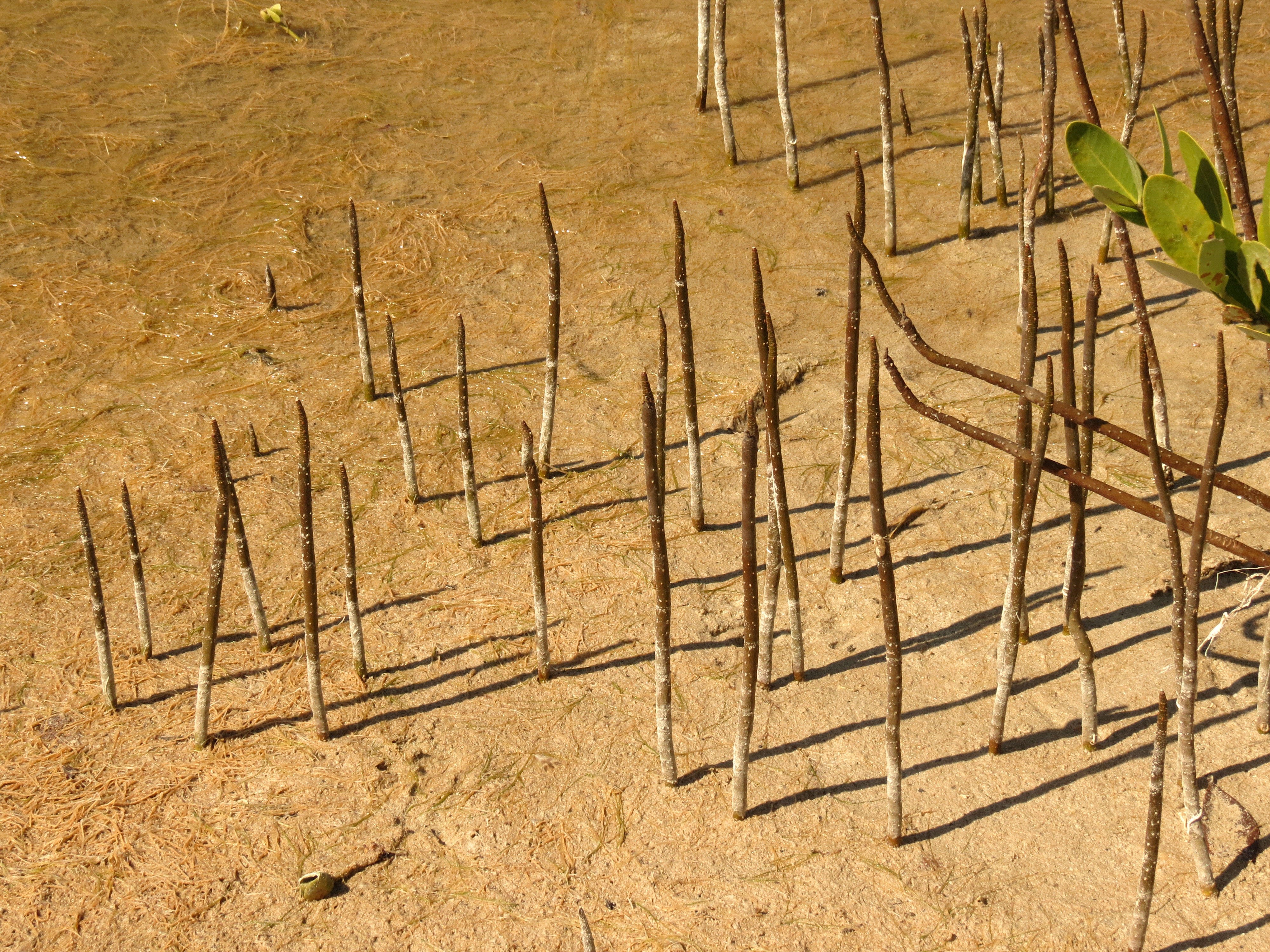 Avicennia germinans. Celestún Biosphere Reserve, Yucatán, México.